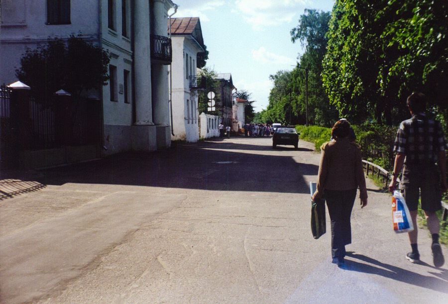 Strato apud rivera bordo en urbo Plos.